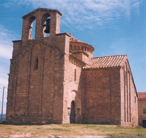 Vista frontal de l'església de Sant Cugat del Racó